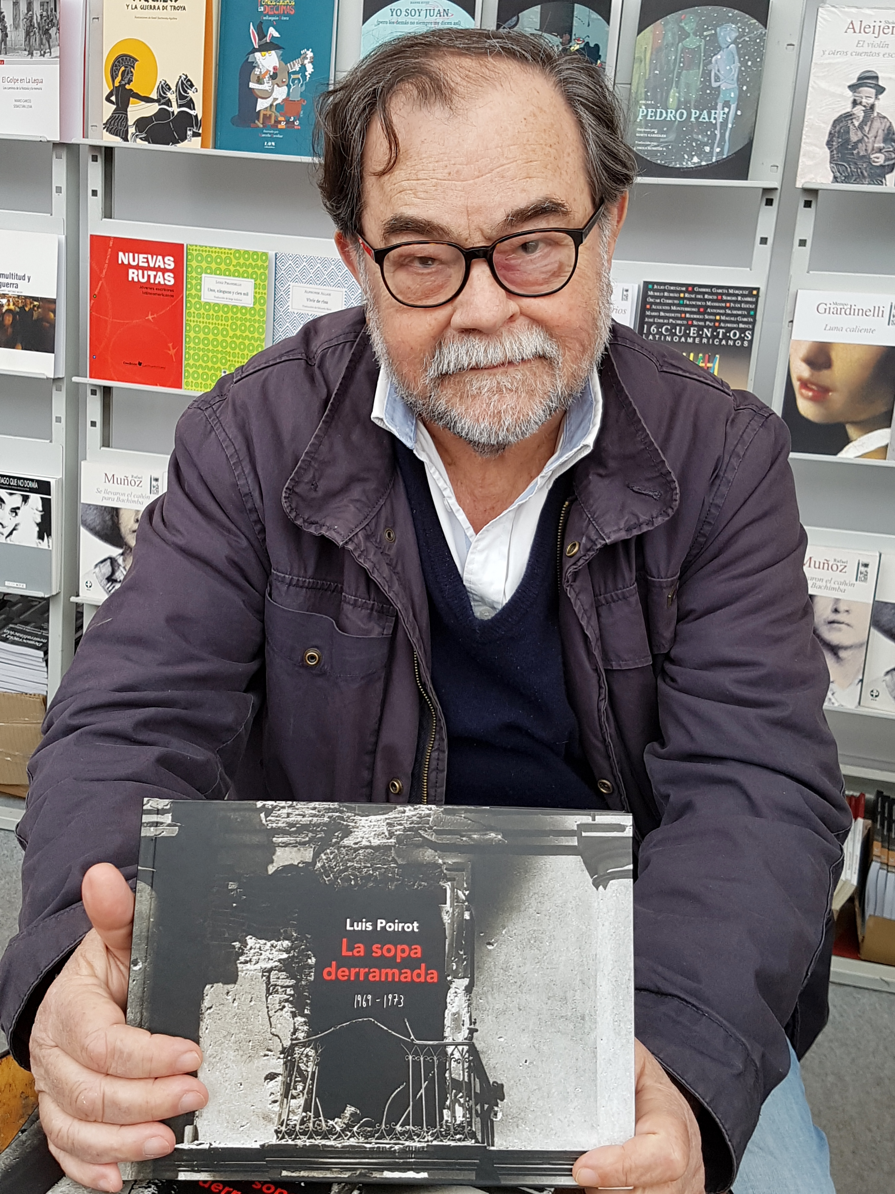 El fotógrafo chileno Luis Poirot firma ejemplares de sus libros en el stand de LOM Ediciones durante la Feria Internacional del Libro de Santiago 2017.